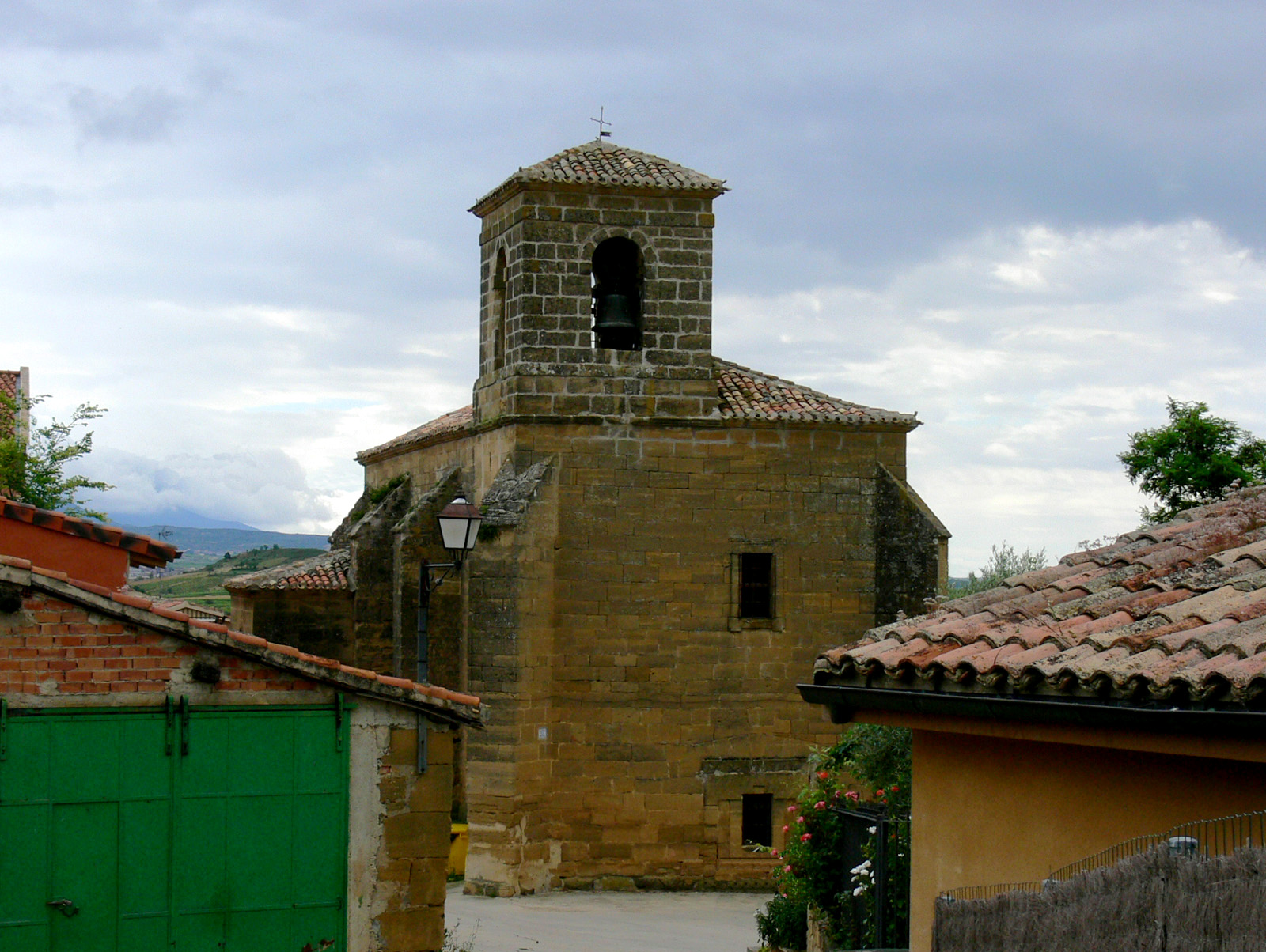 Iglesia de San Martín en Gimileo, La Rioja - España.